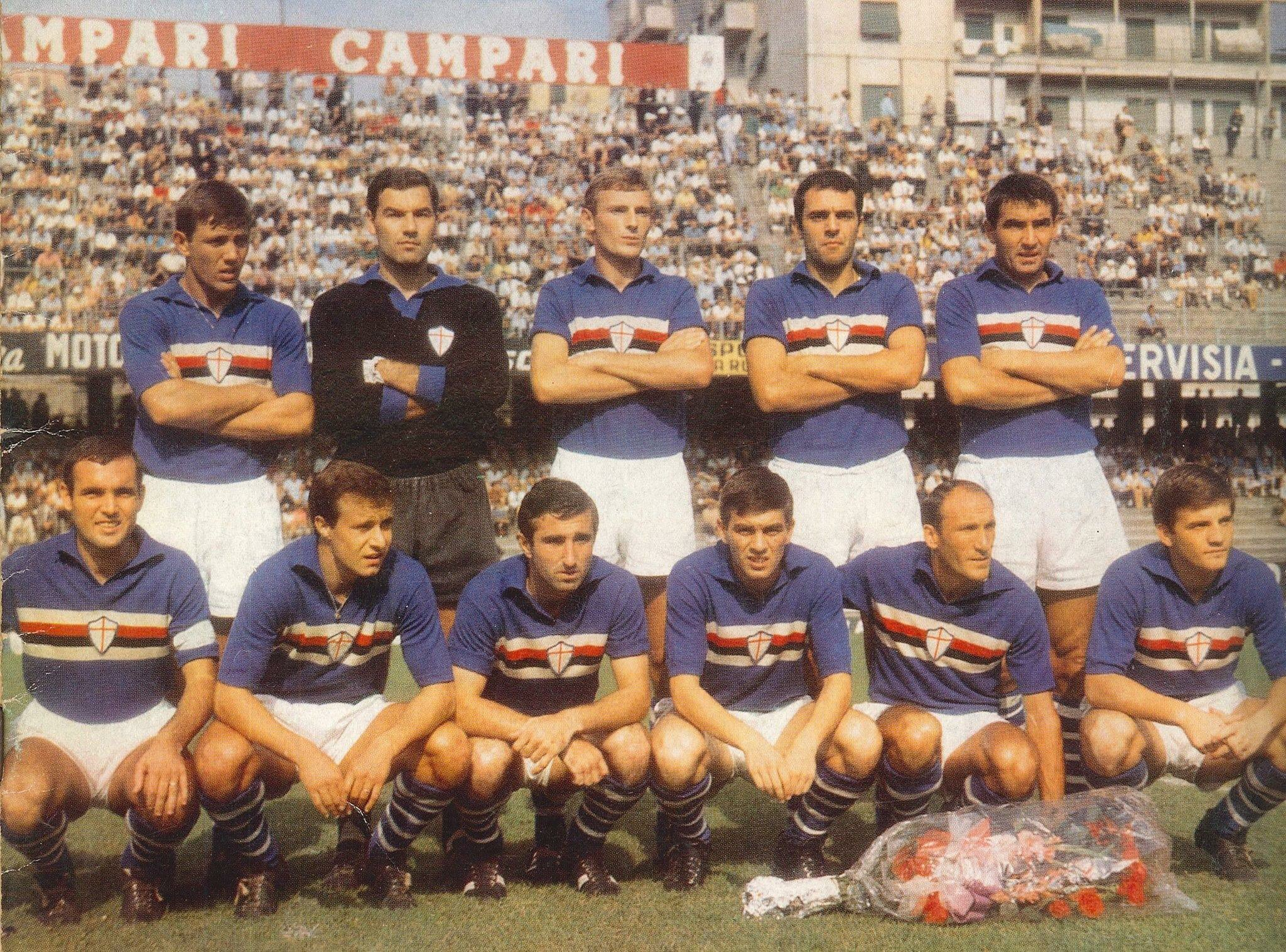 Una formazione della Sampdoria nella stagione 1966-67, in posa all'interno dello stadio Luigi Ferraris di Genova; si riconoscono Francesco Morini (in piedi, al centro) e il capitano Mario Frustalupi (accosciato, primo da sinistra).